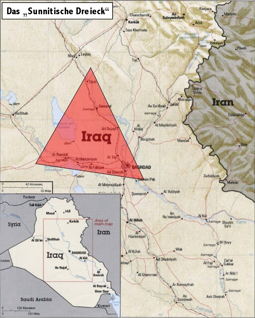 Karte des östlichen Iraks, Sunnitisches Dreieck markiert